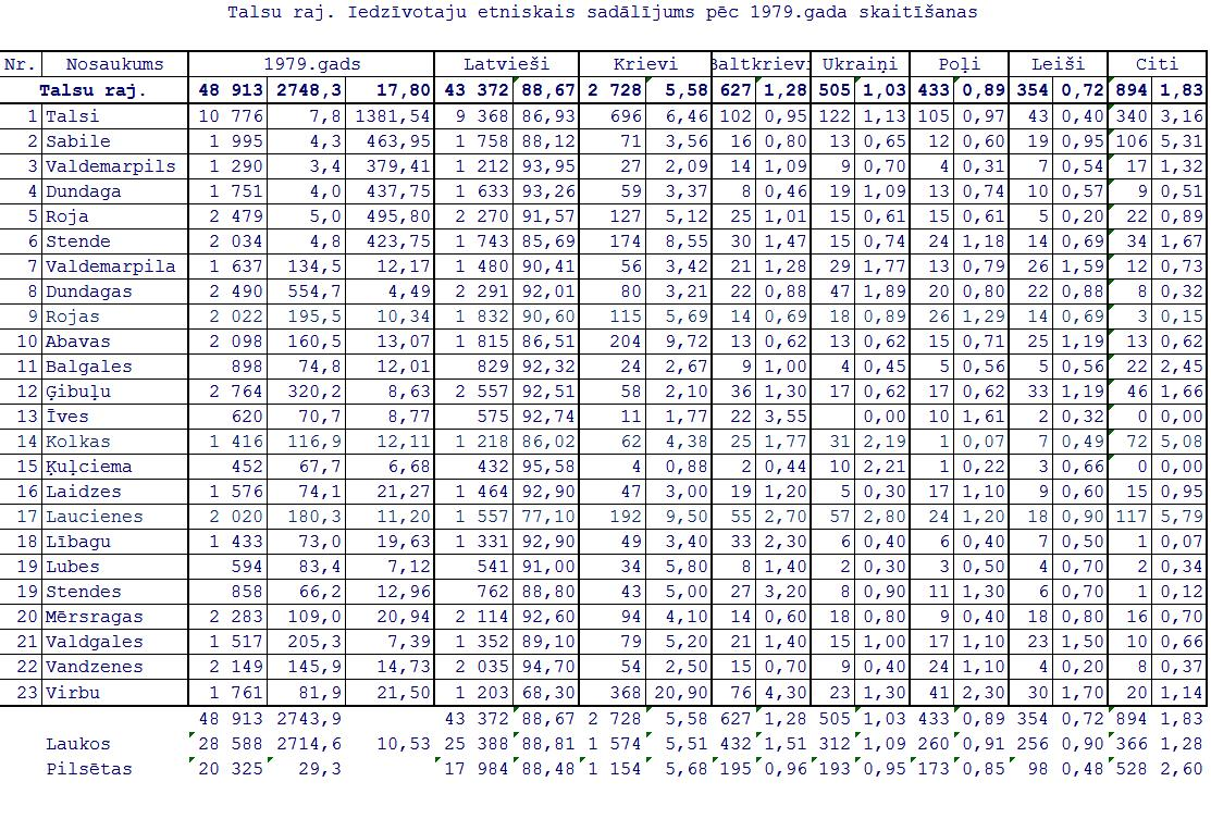 Latvijas 1979 gada skaitīšanas dati